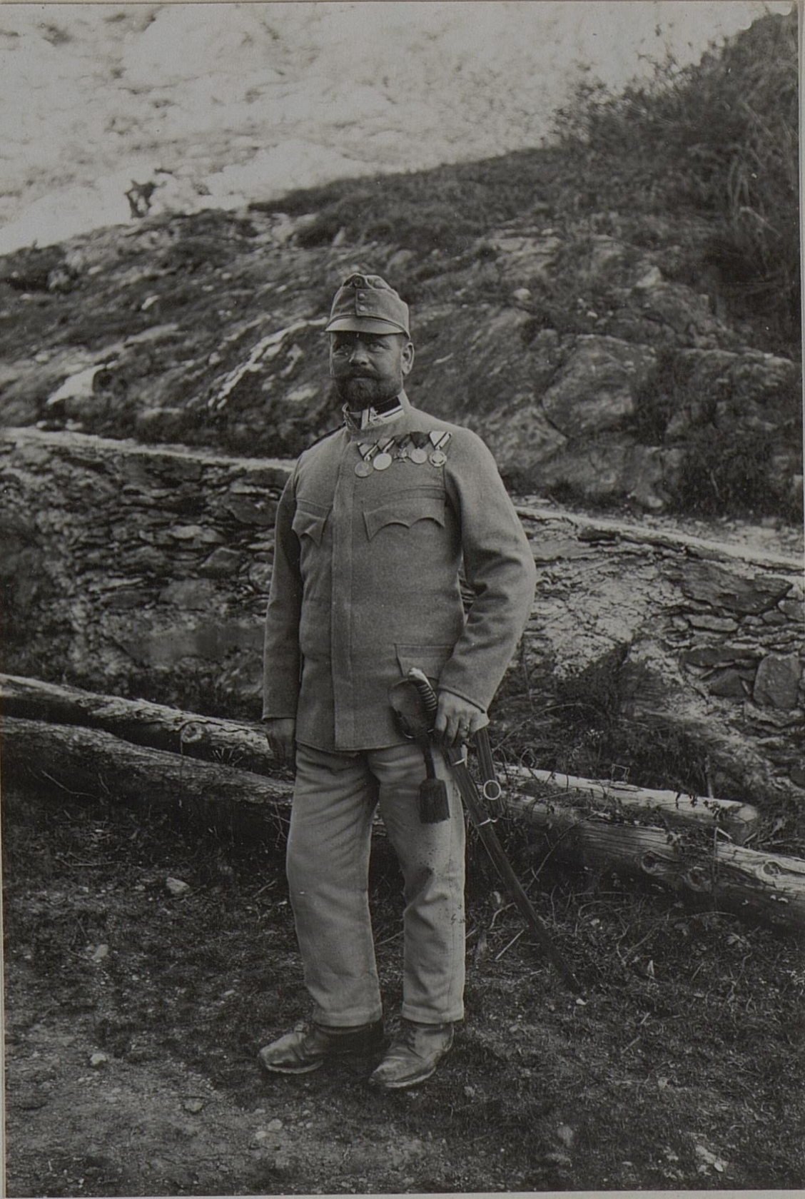 Bezirkswachtmeister Simon STEINBERGER des Landes-Gendarmerie Kommandos Nro. 14.